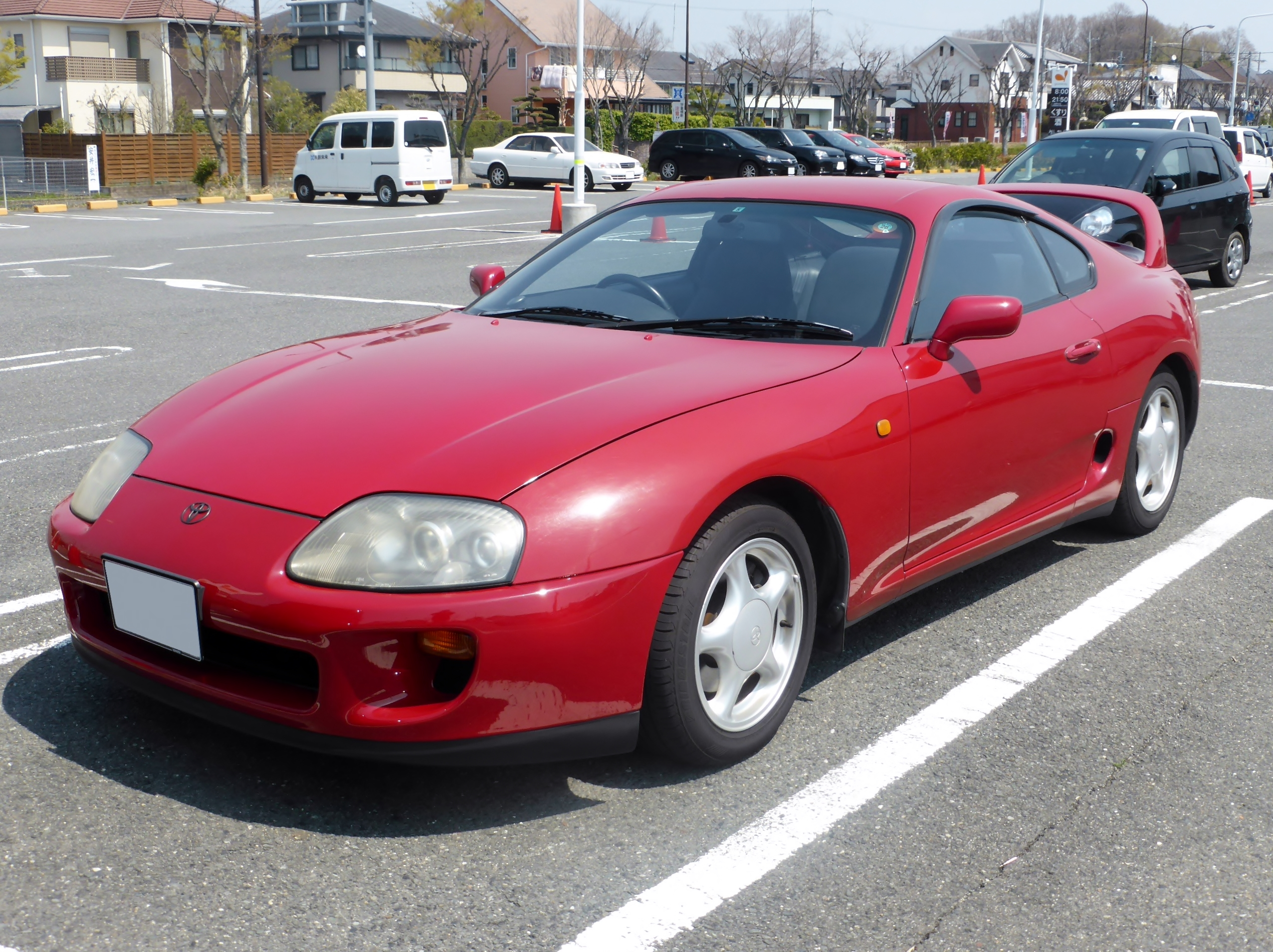 トヨタ・スープラ (A80型)を撮影